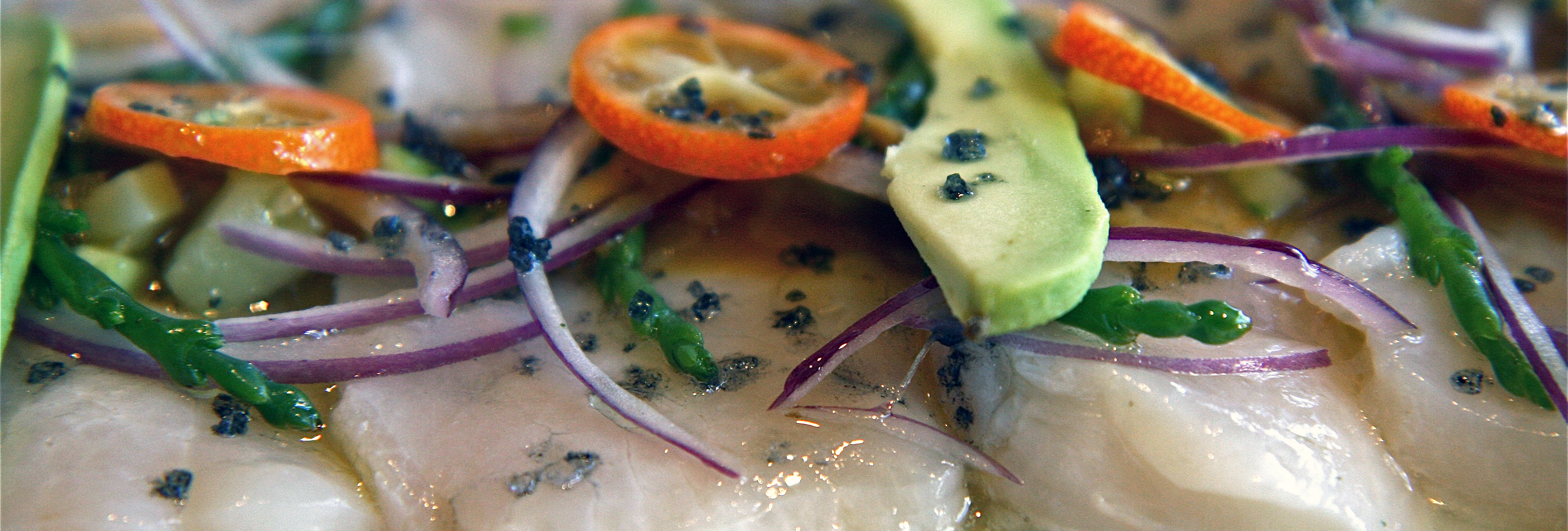 Manjar culinario en Joyuda.